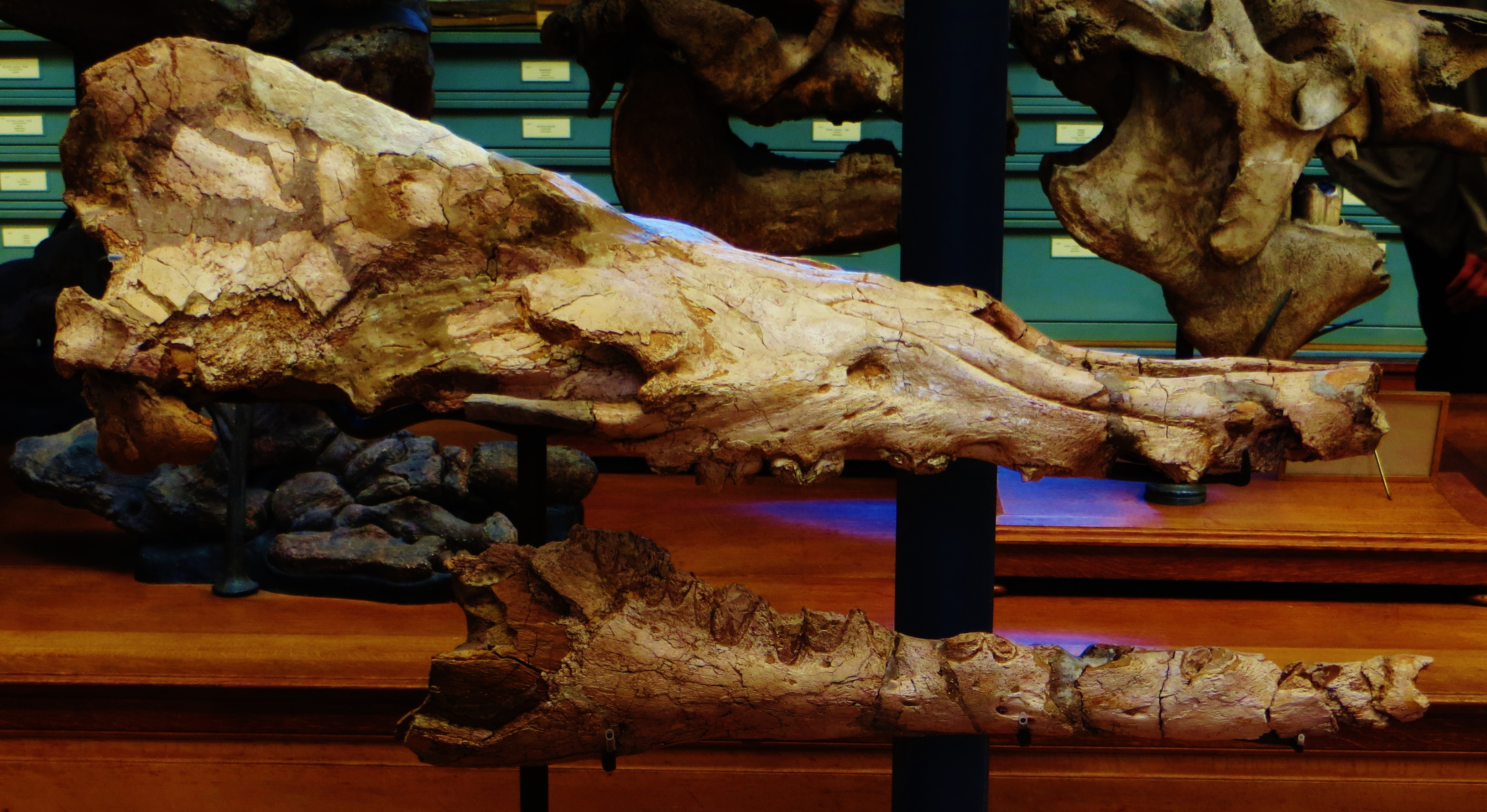 Fossil of Saghacetus, an extinct mammal - Took the photo at Musee d'Histoire Naturelle, Paris